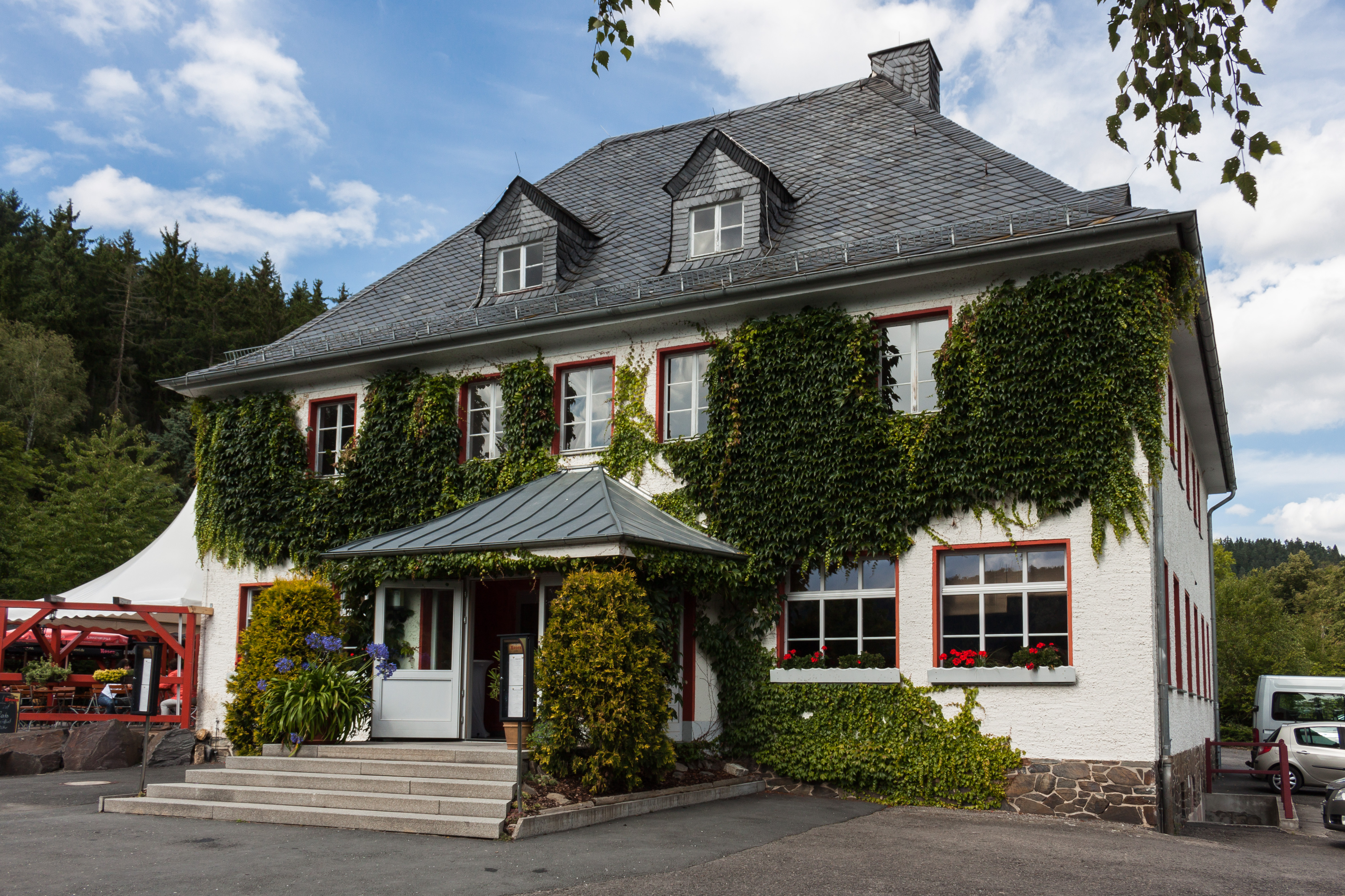 Das Gasthaus Linkenmühle in Paska (Saale-Orla-Kreis, Thüringen).